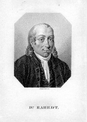 Carl Friedrich Bahrdt